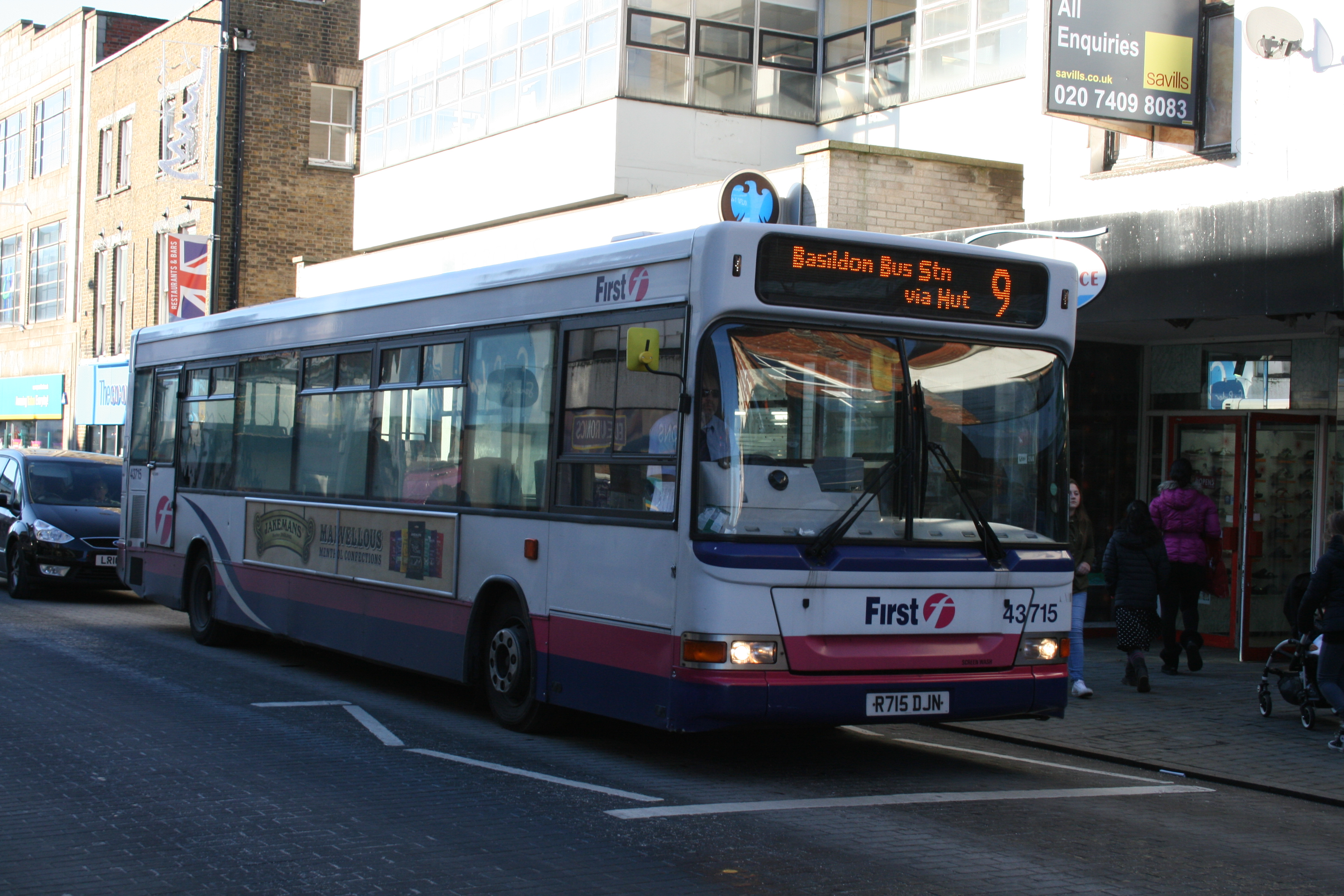 R715 DJN